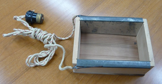 電気パン焼き器。東京九段下 昭和館の所蔵品。